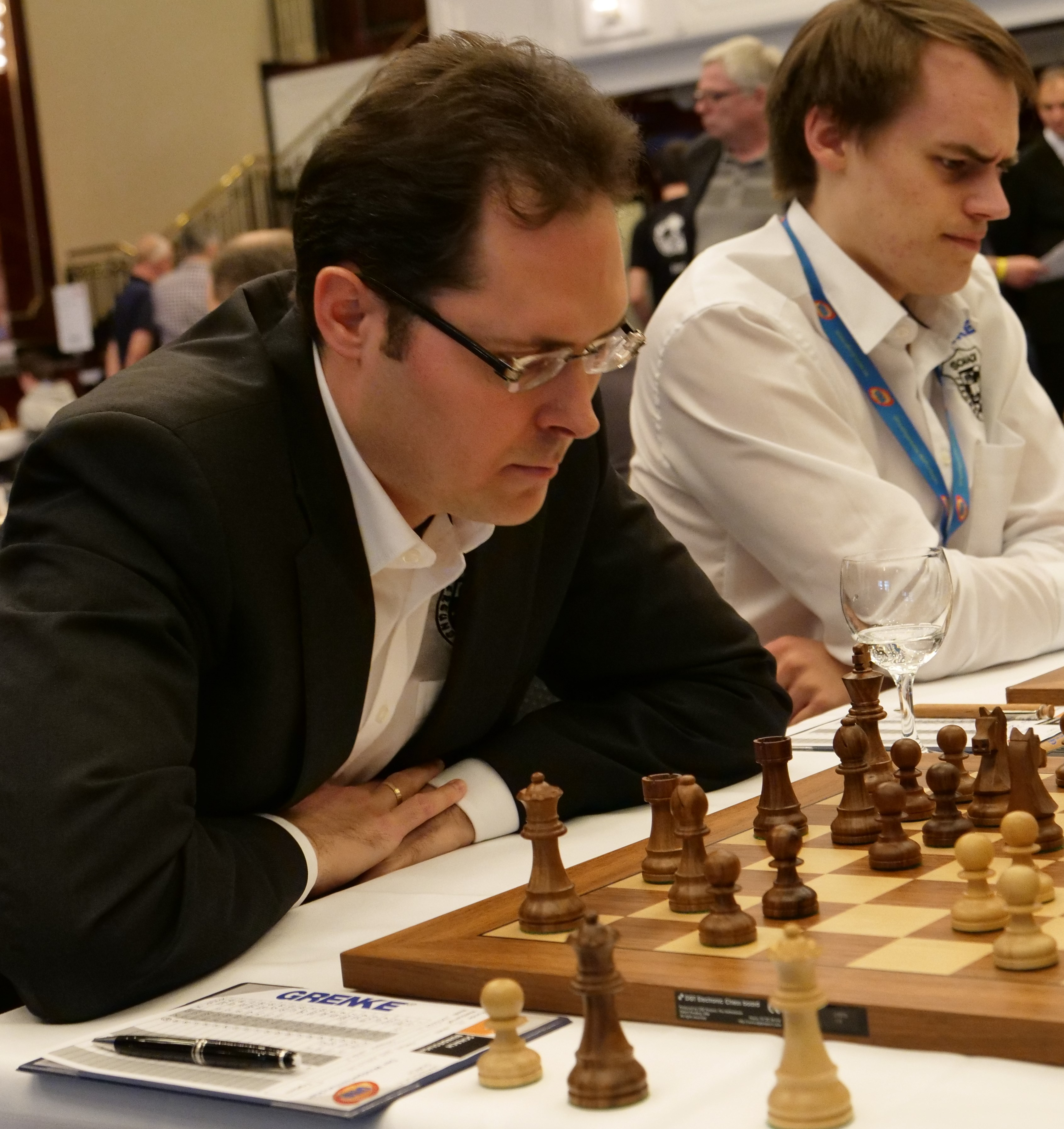 Leko und Blübaum - Bundesliga-Endrunde 30-4-2018